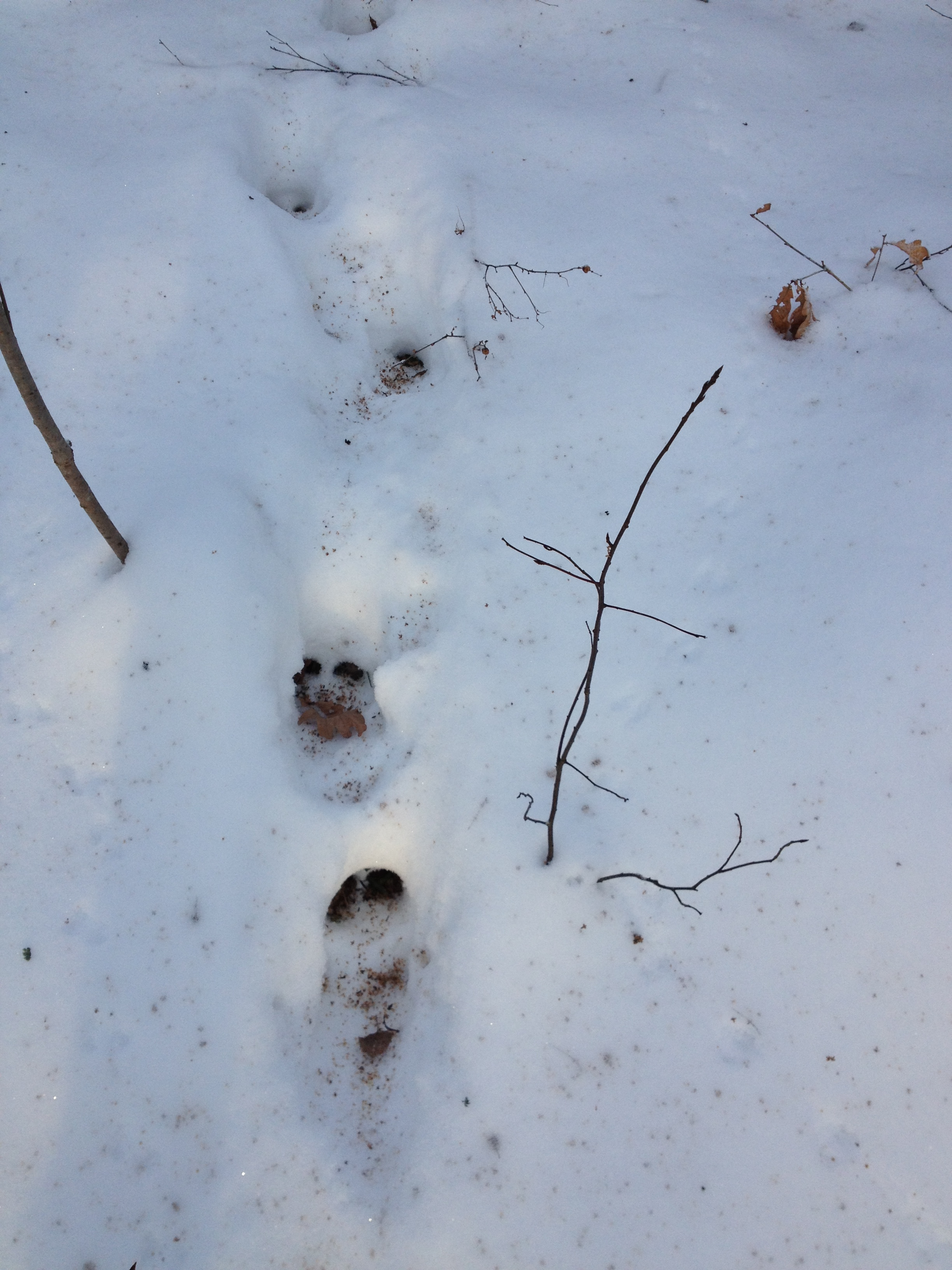 Ульяновский лесопарк - следы кабана